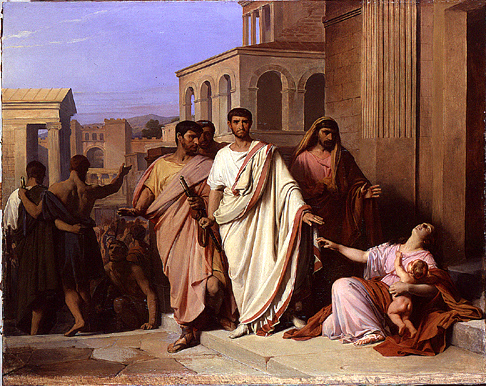 Pierre-Nicolas Brisset, Caïus Gracchus, 1840, Paris, Ecole Nationale Supérieure des Beaux-Arts